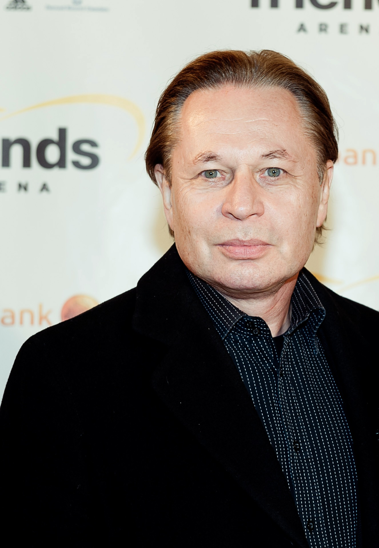 Skådespelaren Reine Brynolfsson vid invigningen av Friends Arena i Solna.